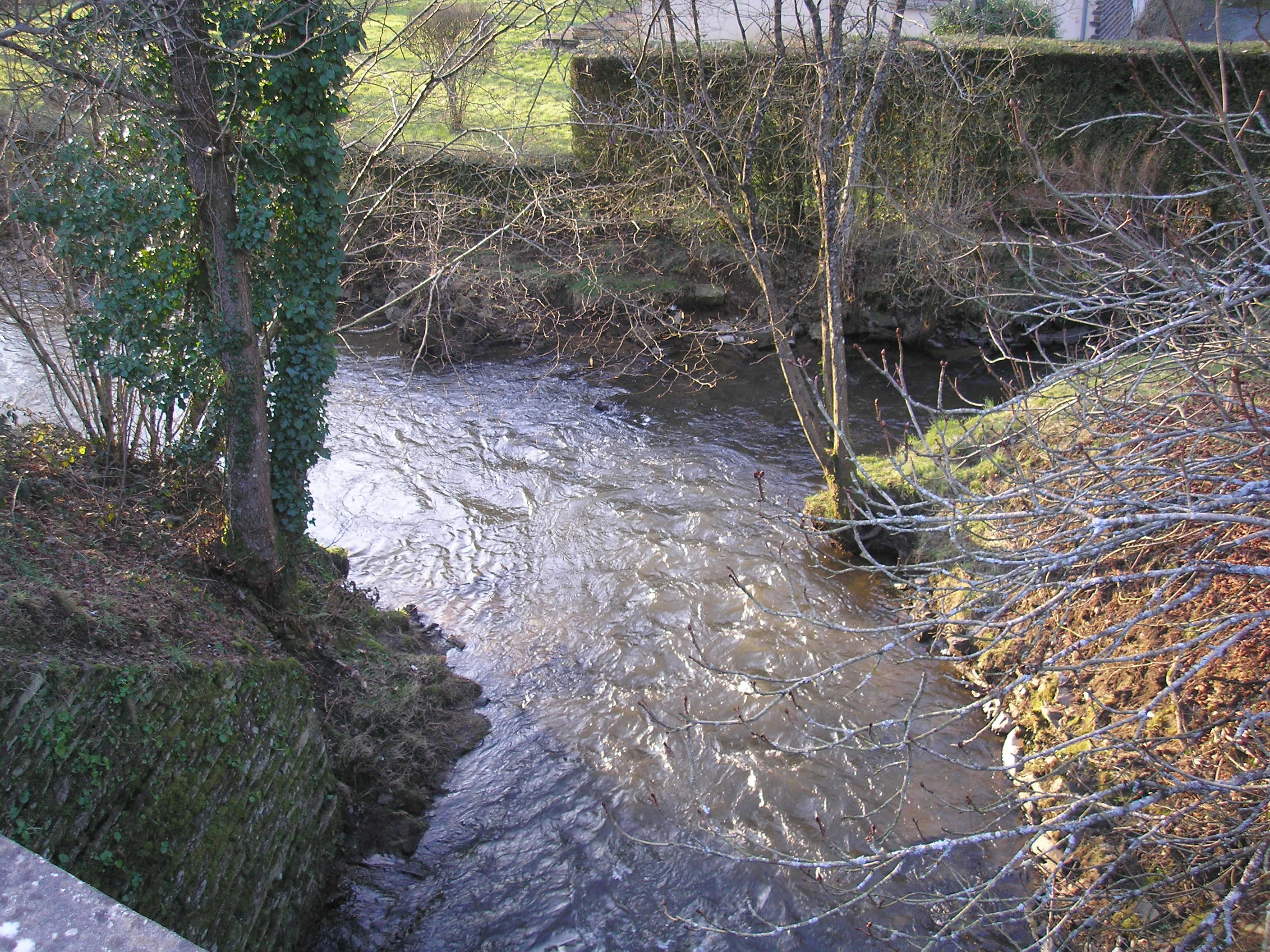 Le confluent de la Sée et de l'Yeurseul entre Brouains,à gauche, Beauficel, au fond, et Sourdeval, à droite (Normandie, France).